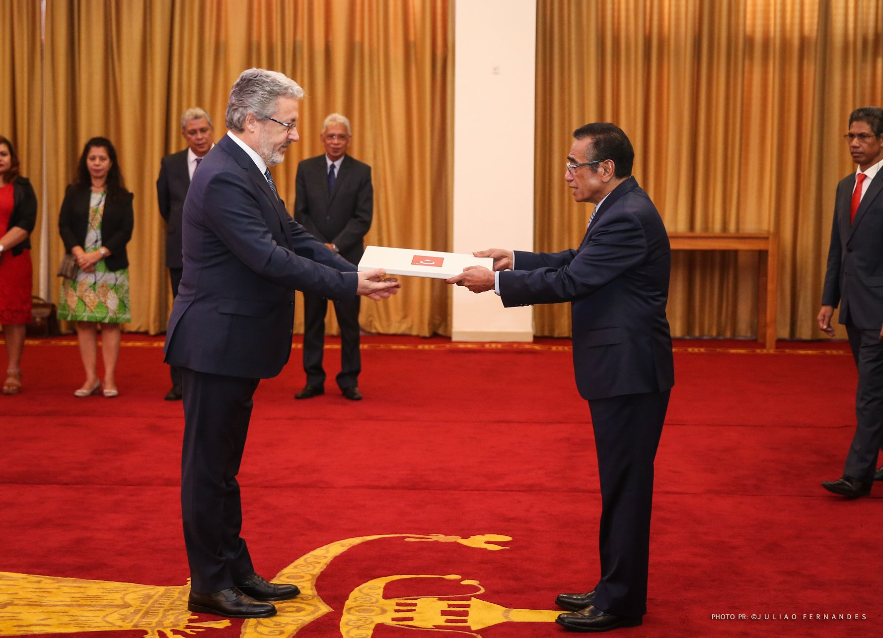 Mahmud Erol Kiliç bei der Übergabe seiner Akkreditierung als türkischer Botschafter in Osttimor